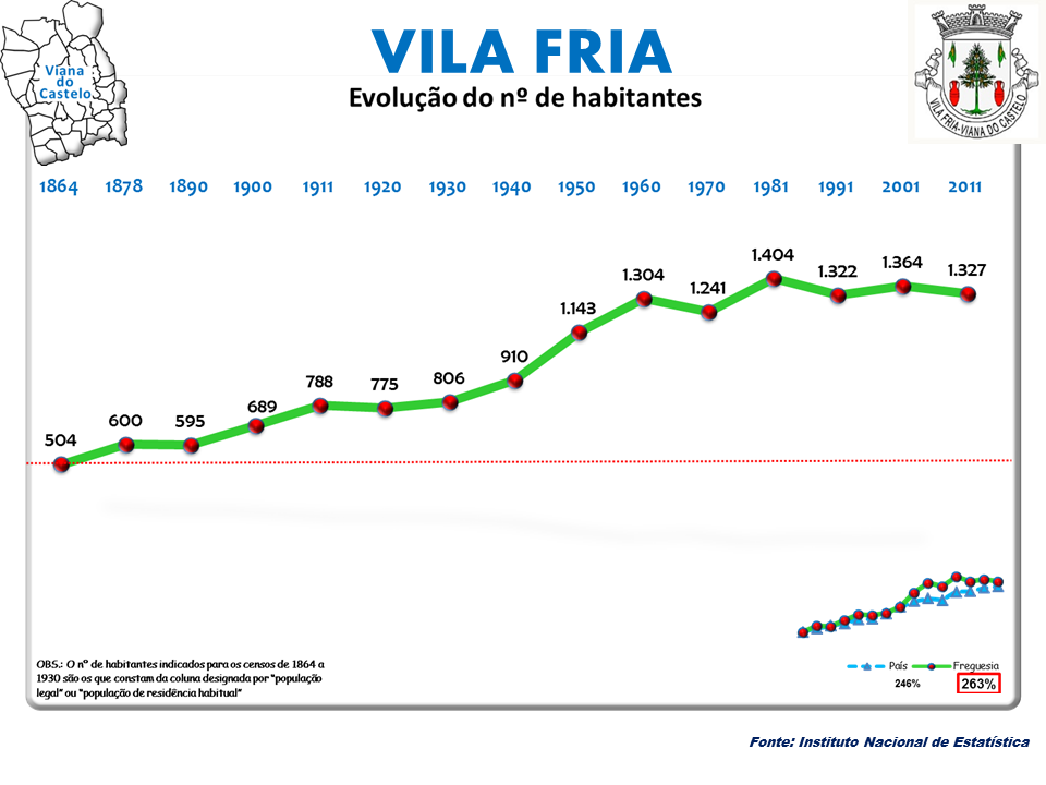 Censos 1864/2011